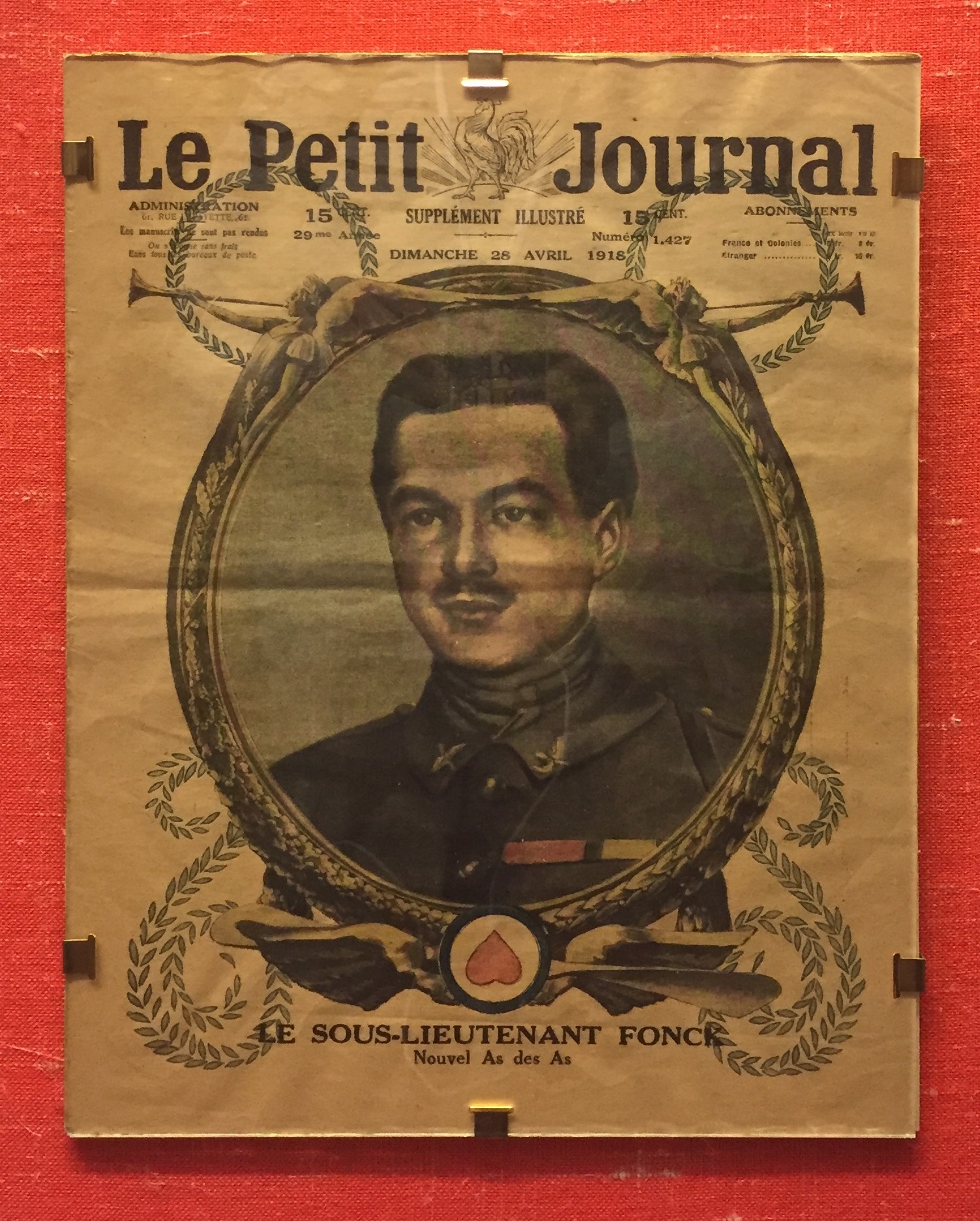 Le Petit Journal - René Fonck.